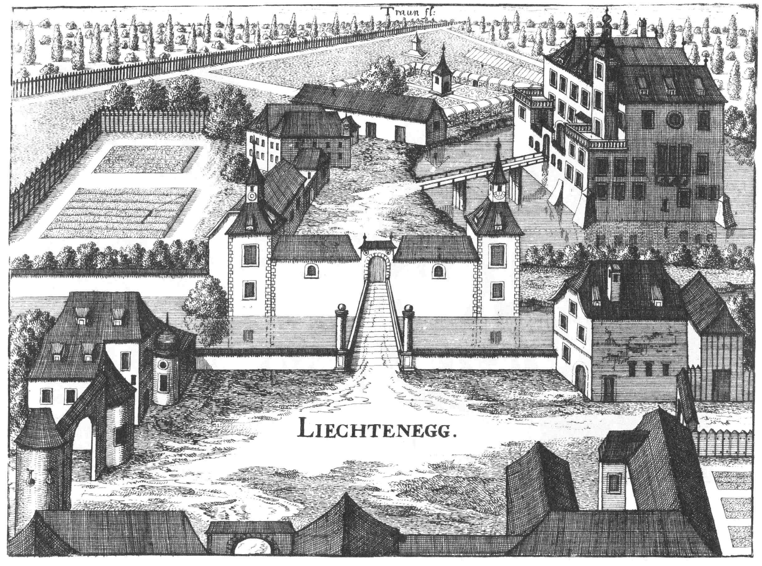 Schloss Lichteneggnach einem Stich von Georg Matthäus Vischer von 1674